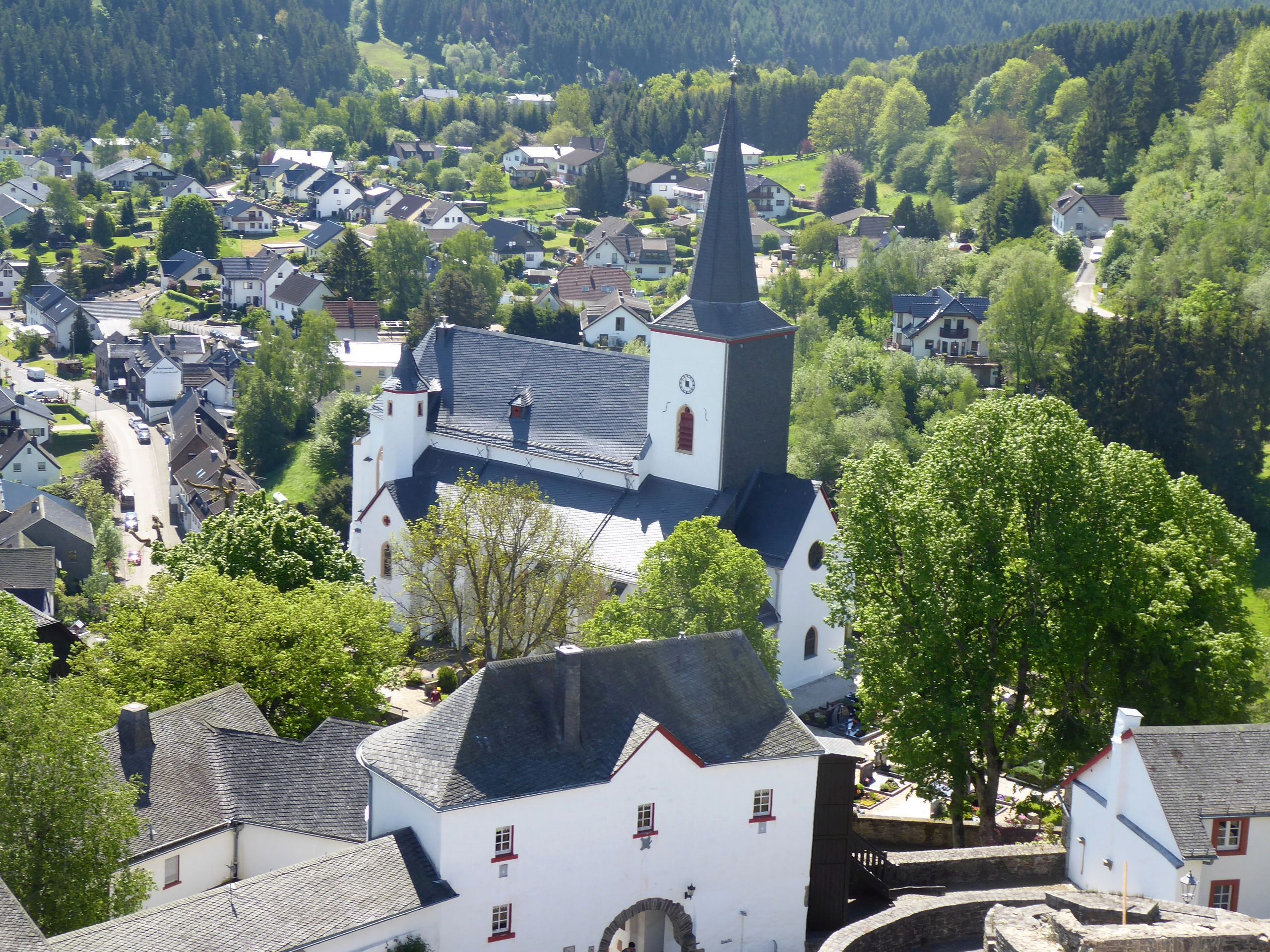 St. Matthias, Hellenthal-Reifferscheid